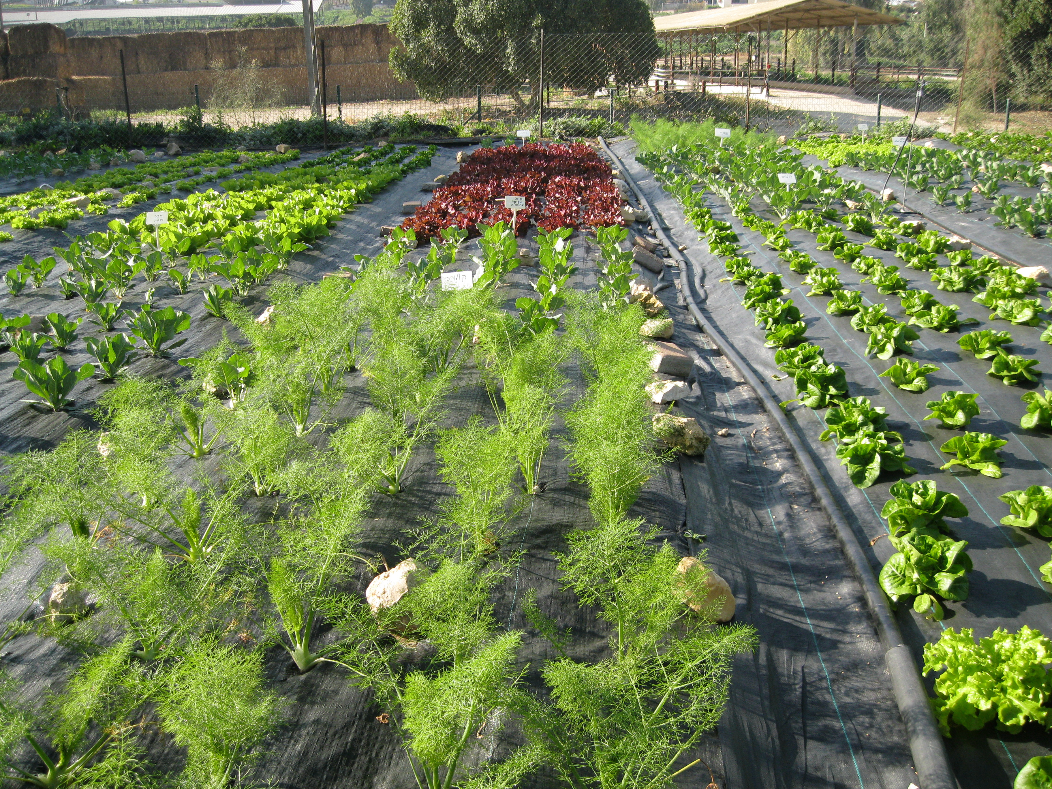 זורעים נתינה